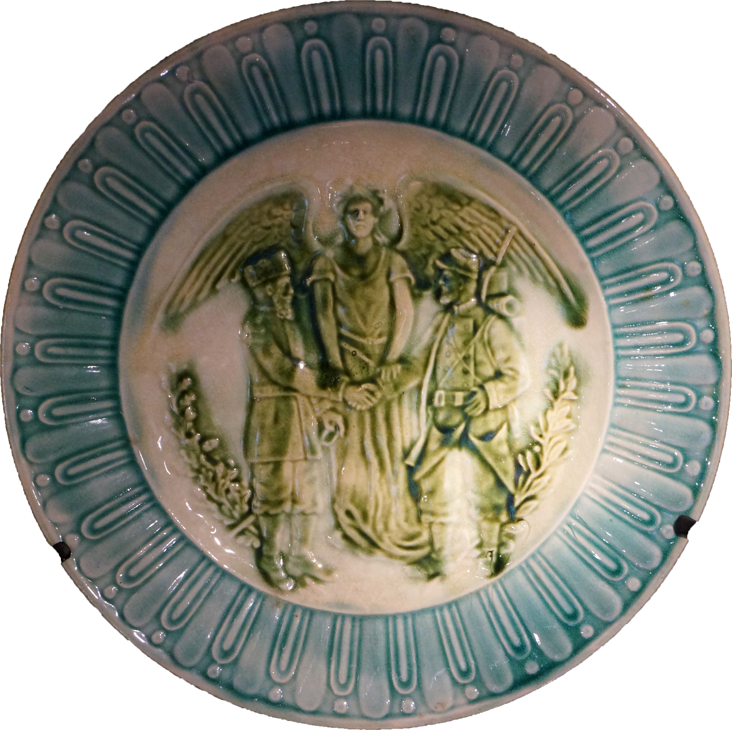 Au Fort de la Pompelle. Assiette éditée en l'honneur de l'amitié franco-russe.